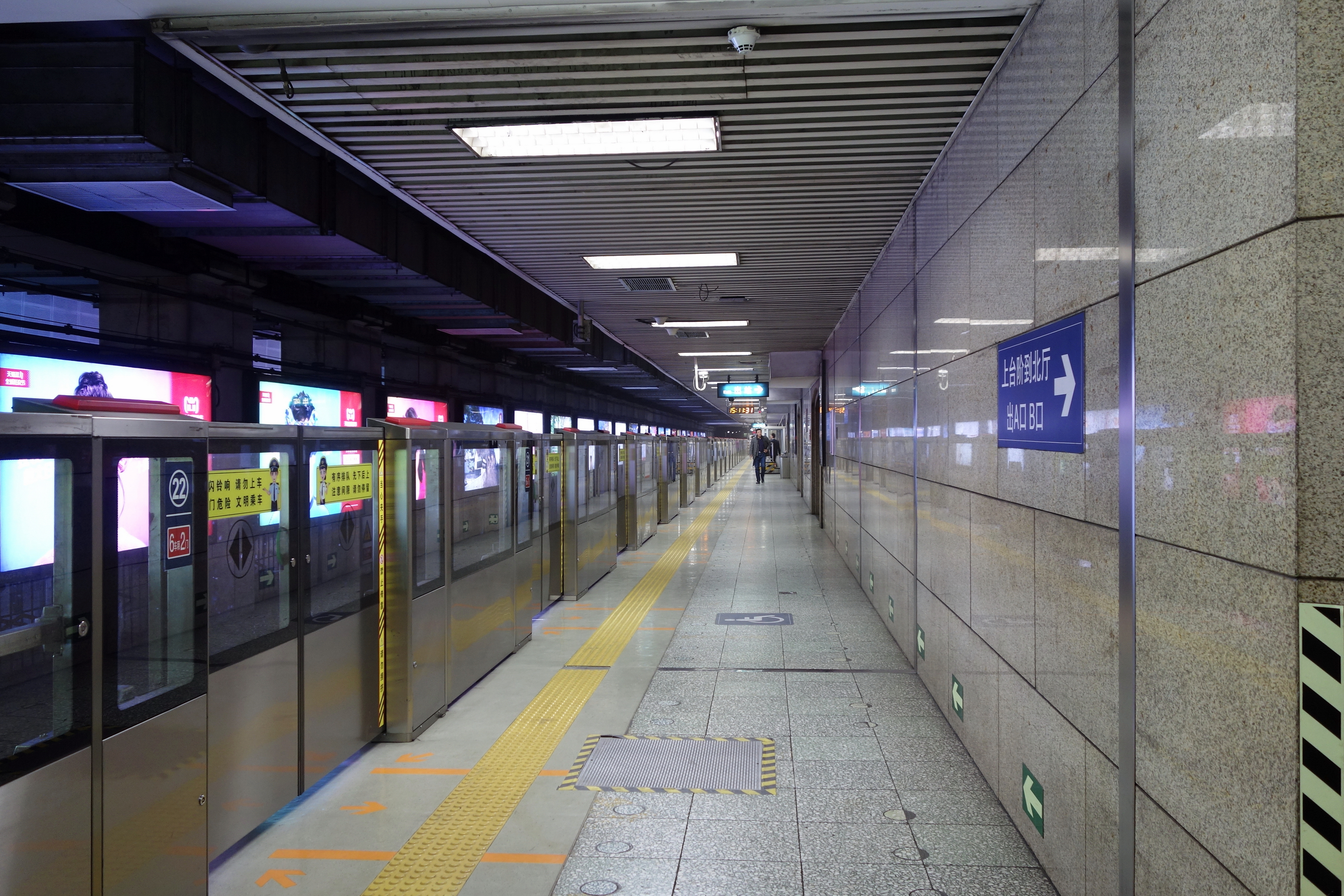 北京地铁1号线古城站侧式站台。站台加装半高式屏蔽门，2017年投入使用。